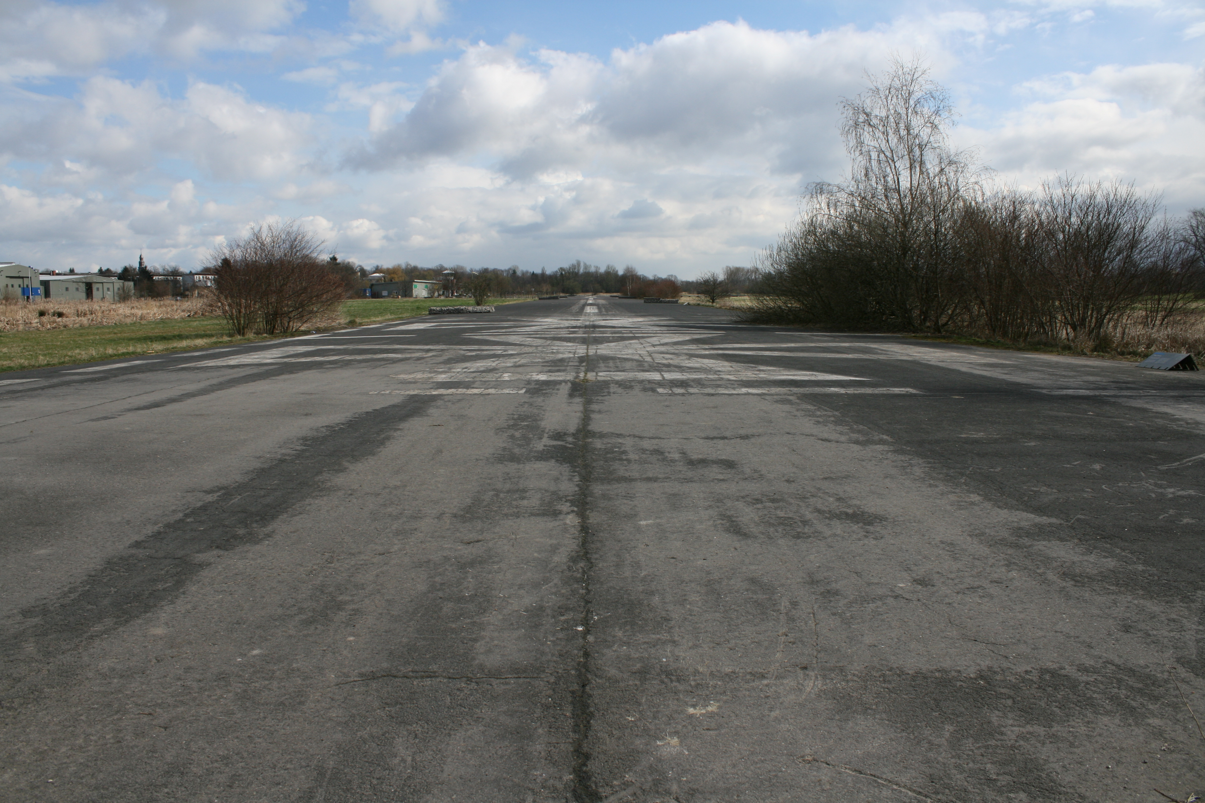 Landebahn am Alten Flugplatz im Frankfurter Grüngürtel